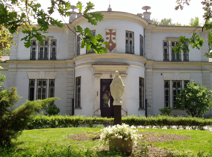 Pałacyk Biernackich na warszawskiej Woli, ul. Wolska nr 27/29, (fot Zu)